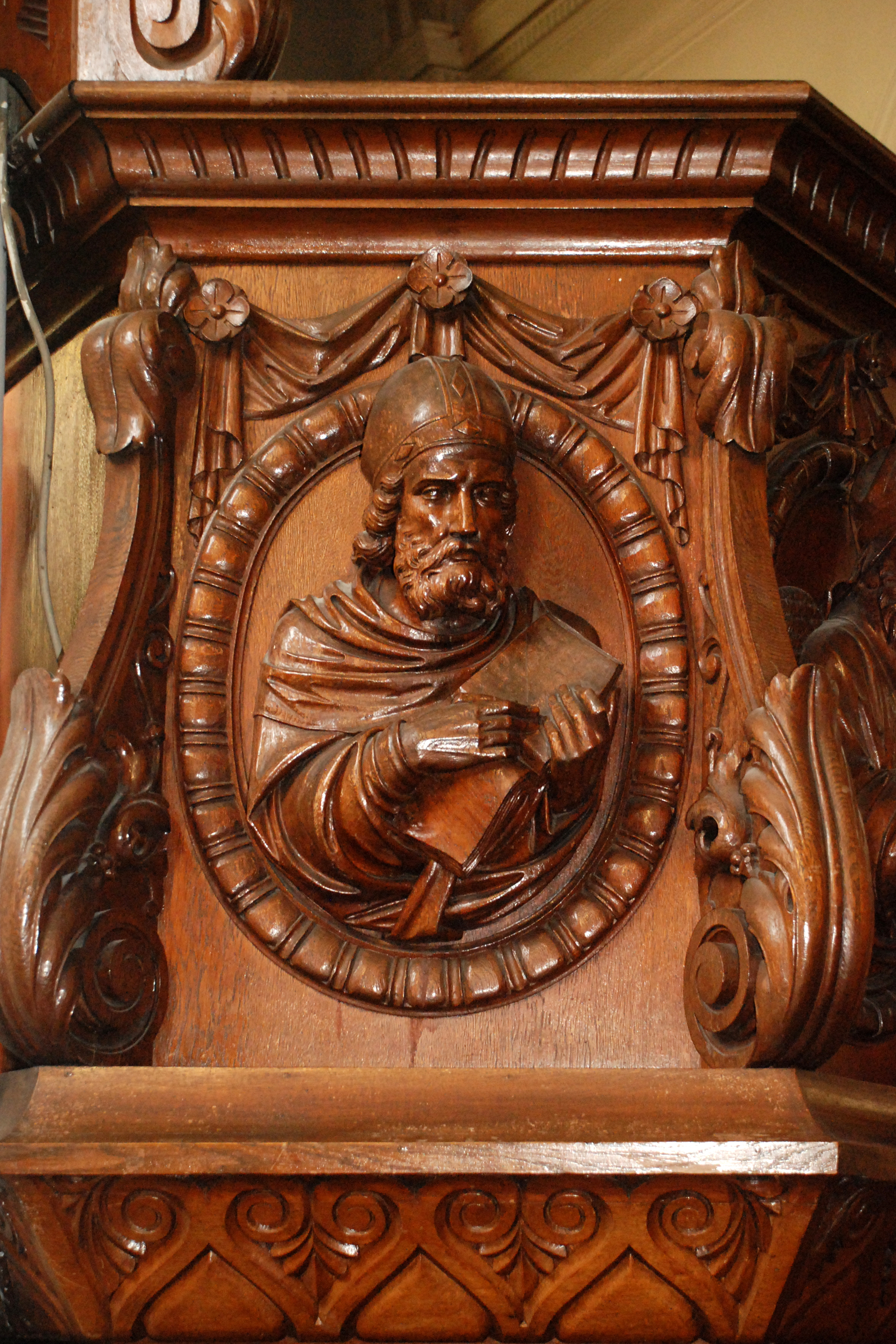 Belgique - Bousval - Église Saint-Barthélemy de Bousval